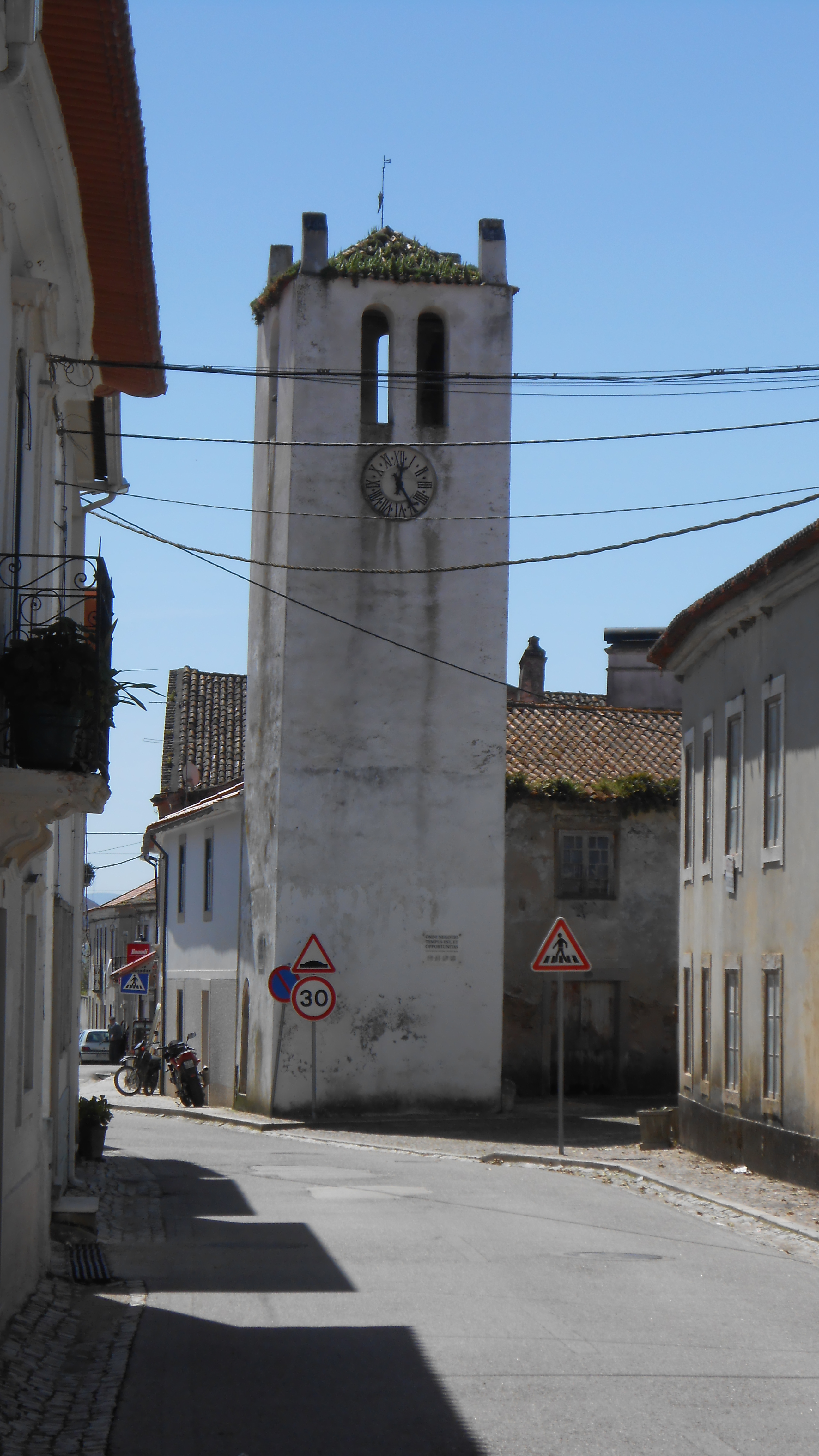 Torre do Relógio, Tentúgal